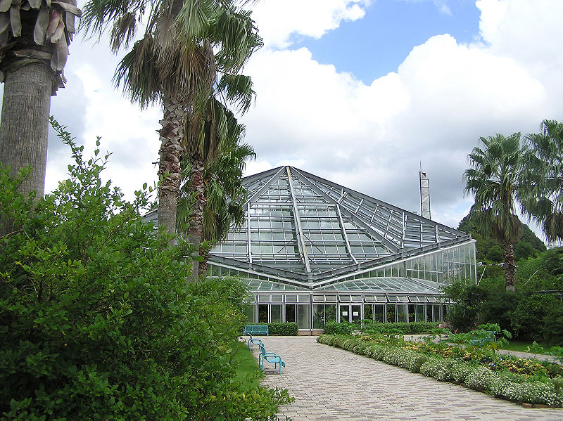 "Hamamatsu fruit park" Hamamatsu Japan